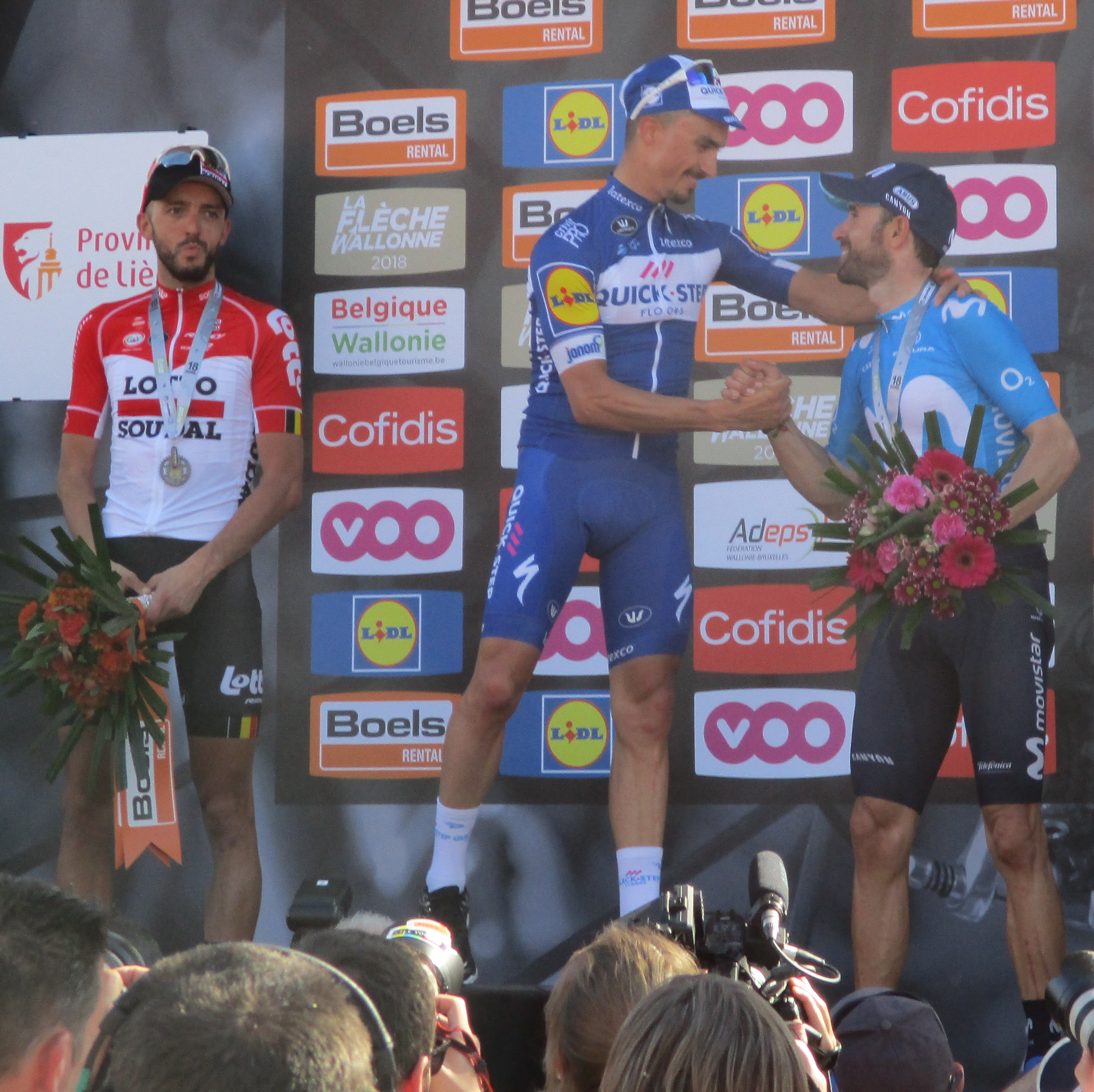 Waalse Pijl 2018 op de Mur van Huy. 1. Julian Alaphilippe; 2. Alejandro Valverde; 3. Jelle Vanendert